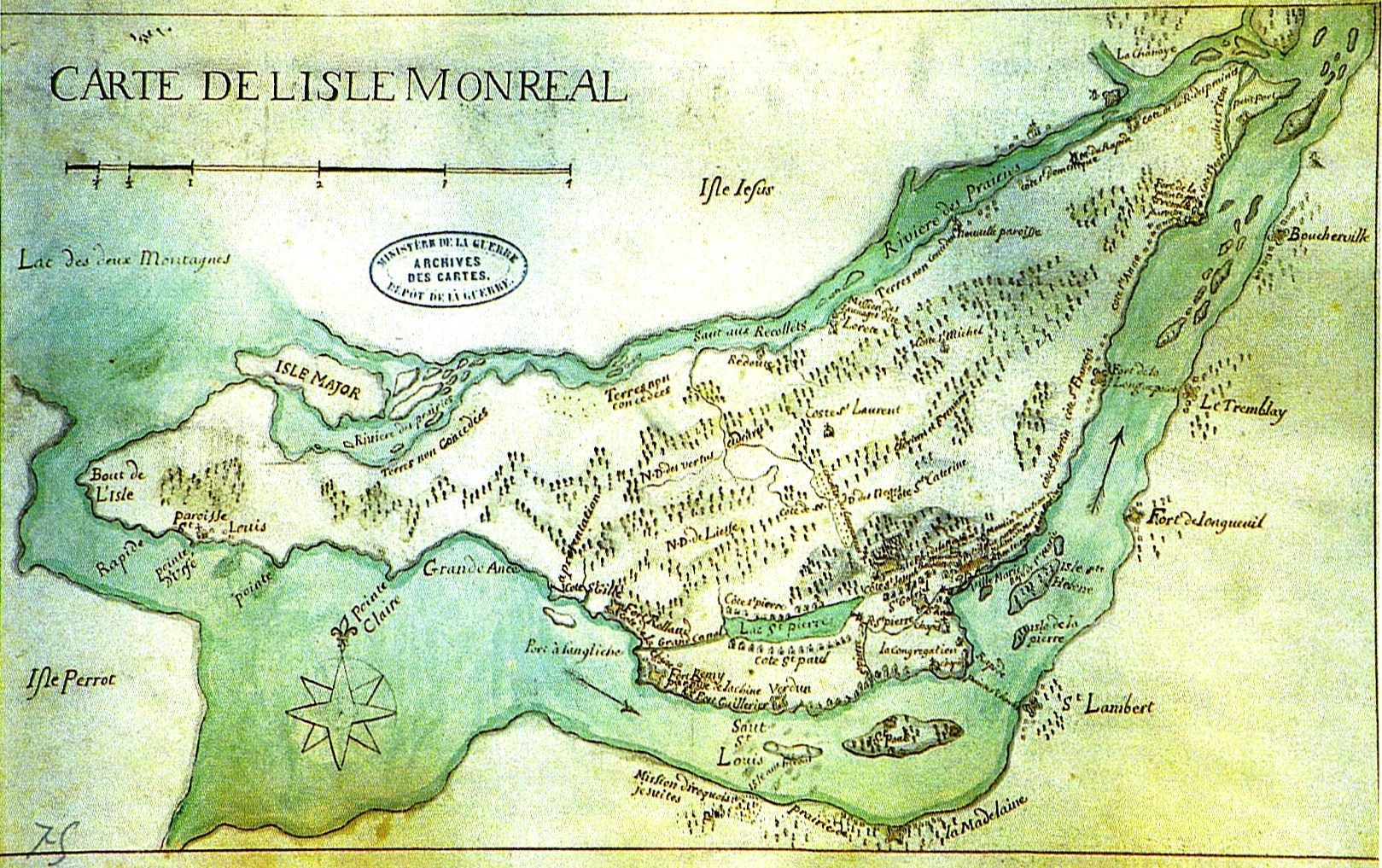 Sur la carte des années 1700, on peut voir, sur le pourtour de l'île et sur la rive sud du fleuve, tous ces forts qui allaient devenir bientôt des bourgs et des villages.